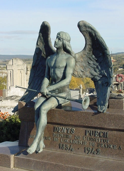 Tombe du sculpteur Denys Puech au cimetière de Rodez